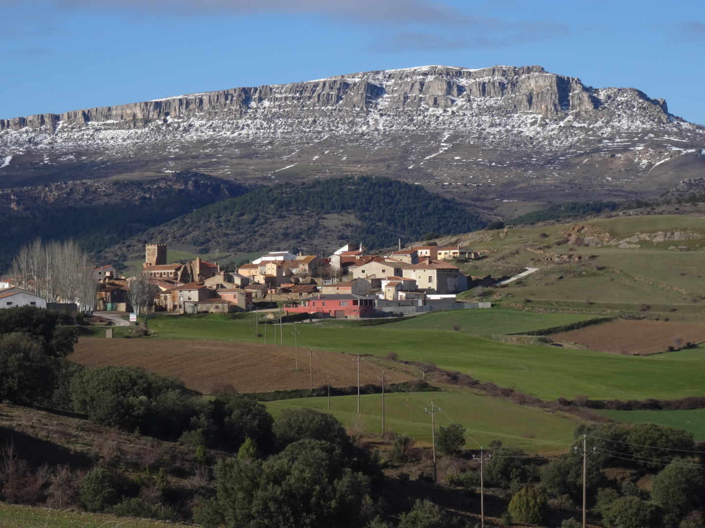 Vista de Bádenas con la sierra de Cucalón al fondo